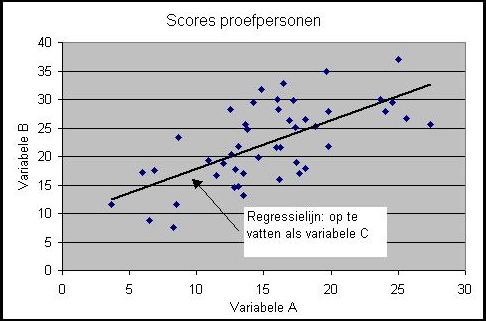 puntenwolk met regressielijn